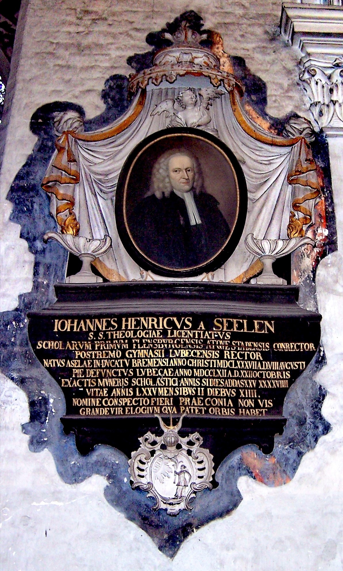 Memorial to Joh. H. von Seelen, Katharinenkirche Lübeck